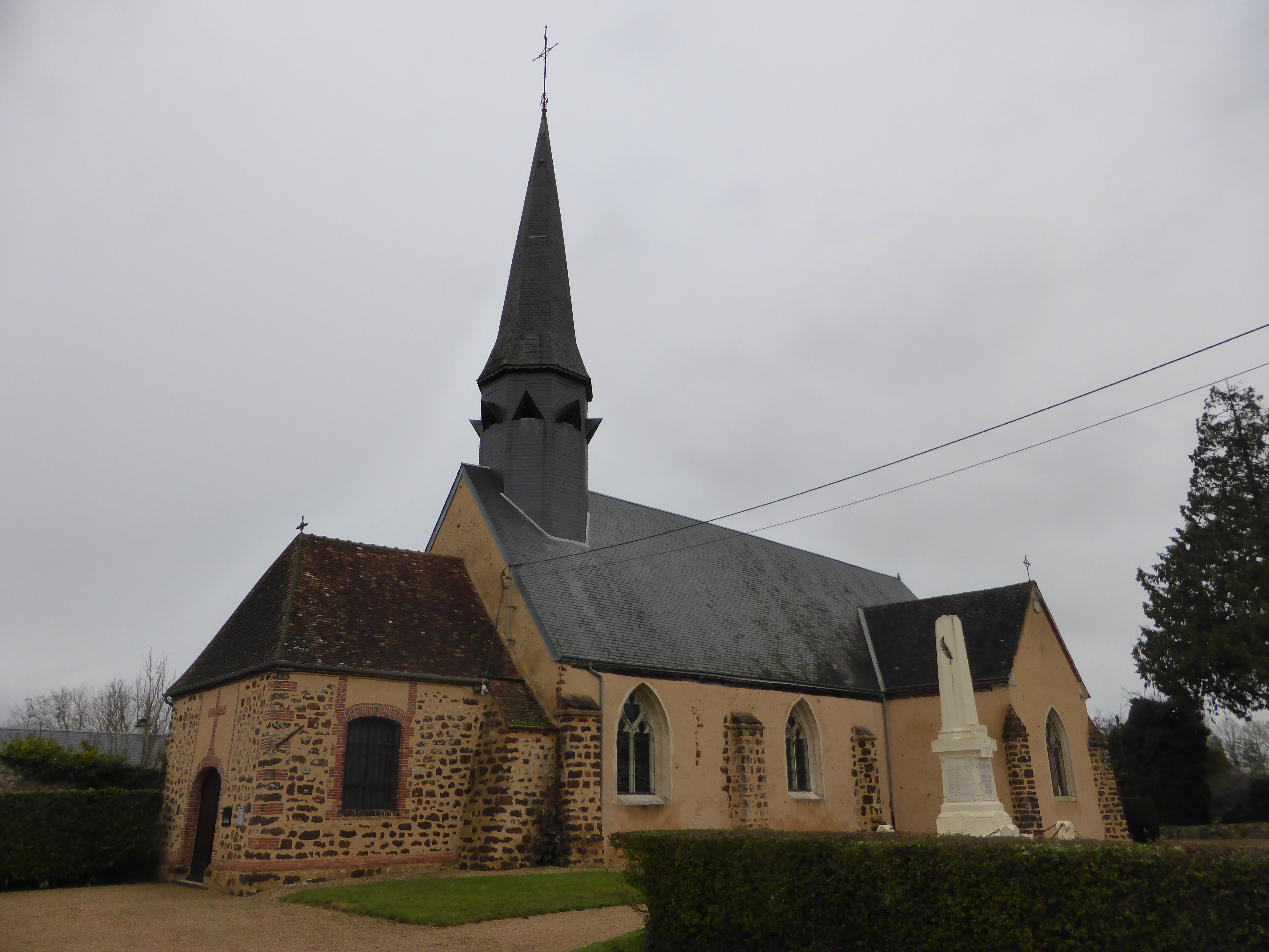 Le monument aux morts et l'église Notre-Dame de Fontaine-Simon, dans l'Eure-et-loir.